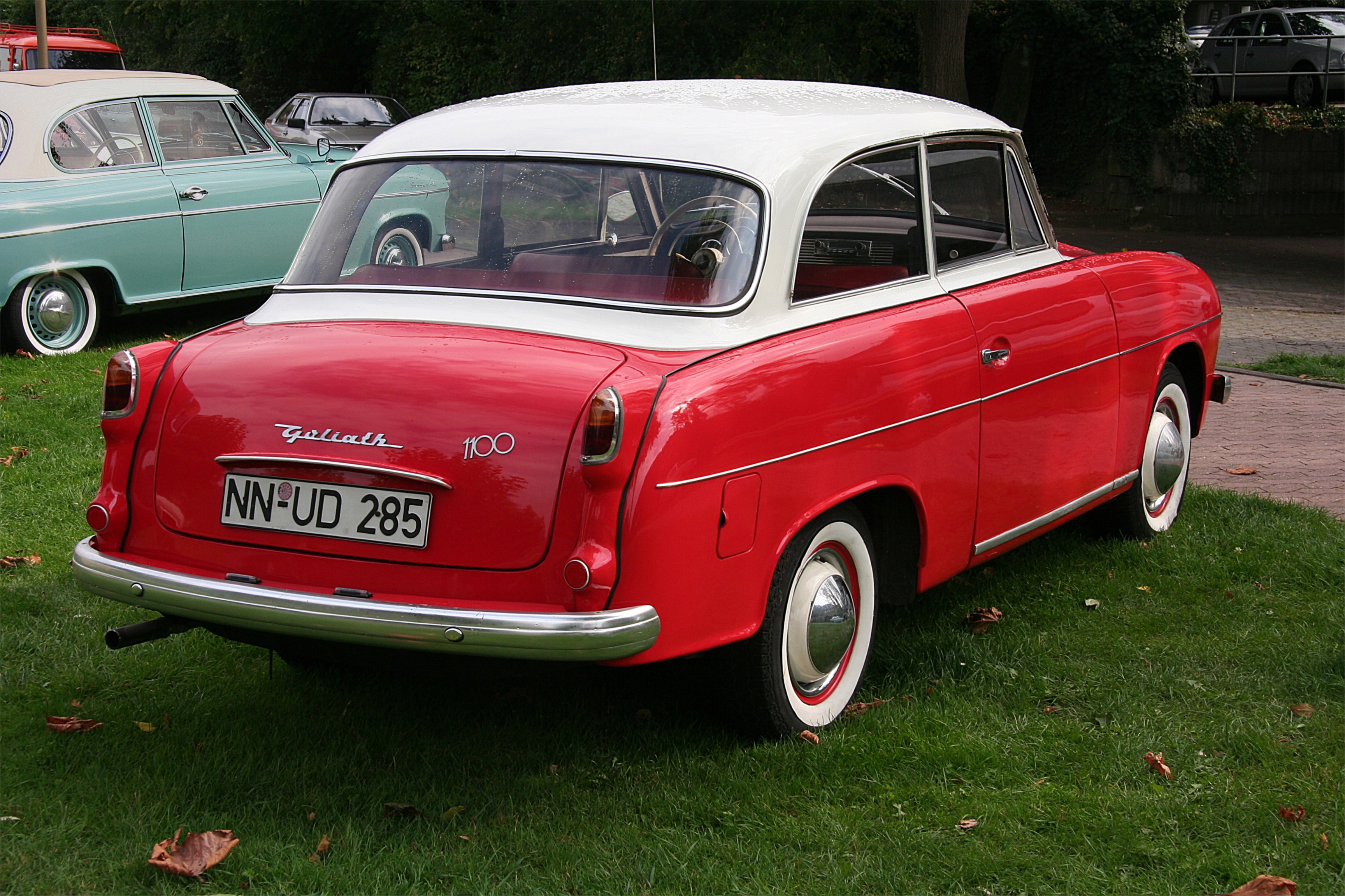 Goliath 1100 (Heck) beim Borgwardtreffen in Andernach